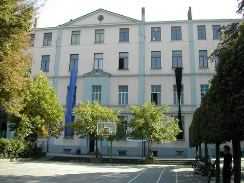 Institut Saint-Boniface-Parnasse d'Ixelles